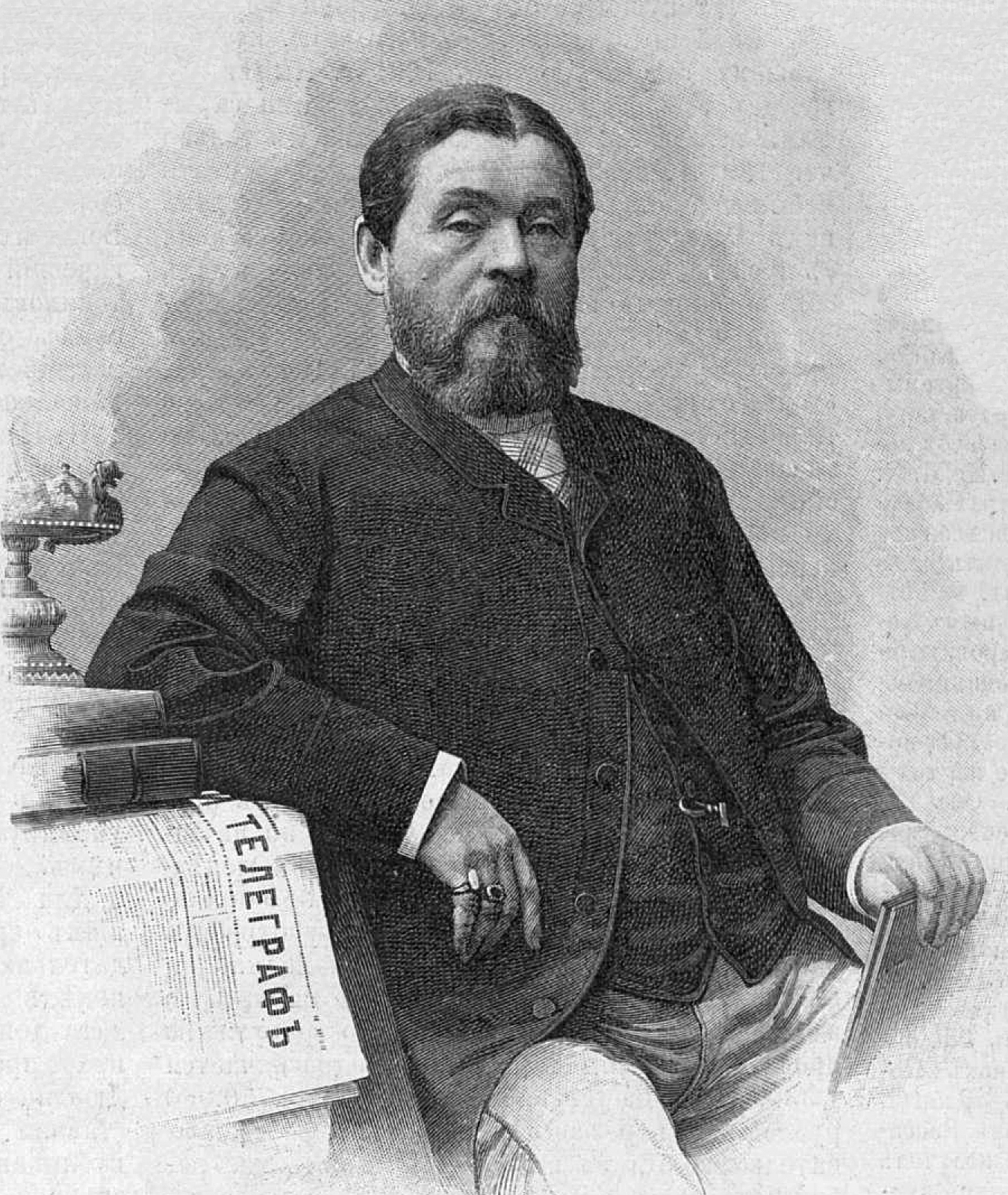 Озмидов Михаил Павлович, издатель, гравюра 1880-х годов